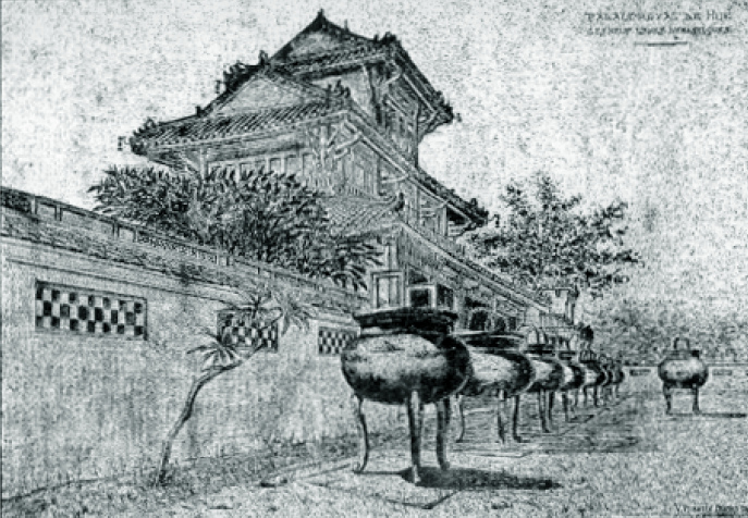 Tranh vẽ Cửu đỉnh và Thế miếu trong tận san Những người bạn Cố đô Huế no.1 năm 1914 (BAVH 1914)